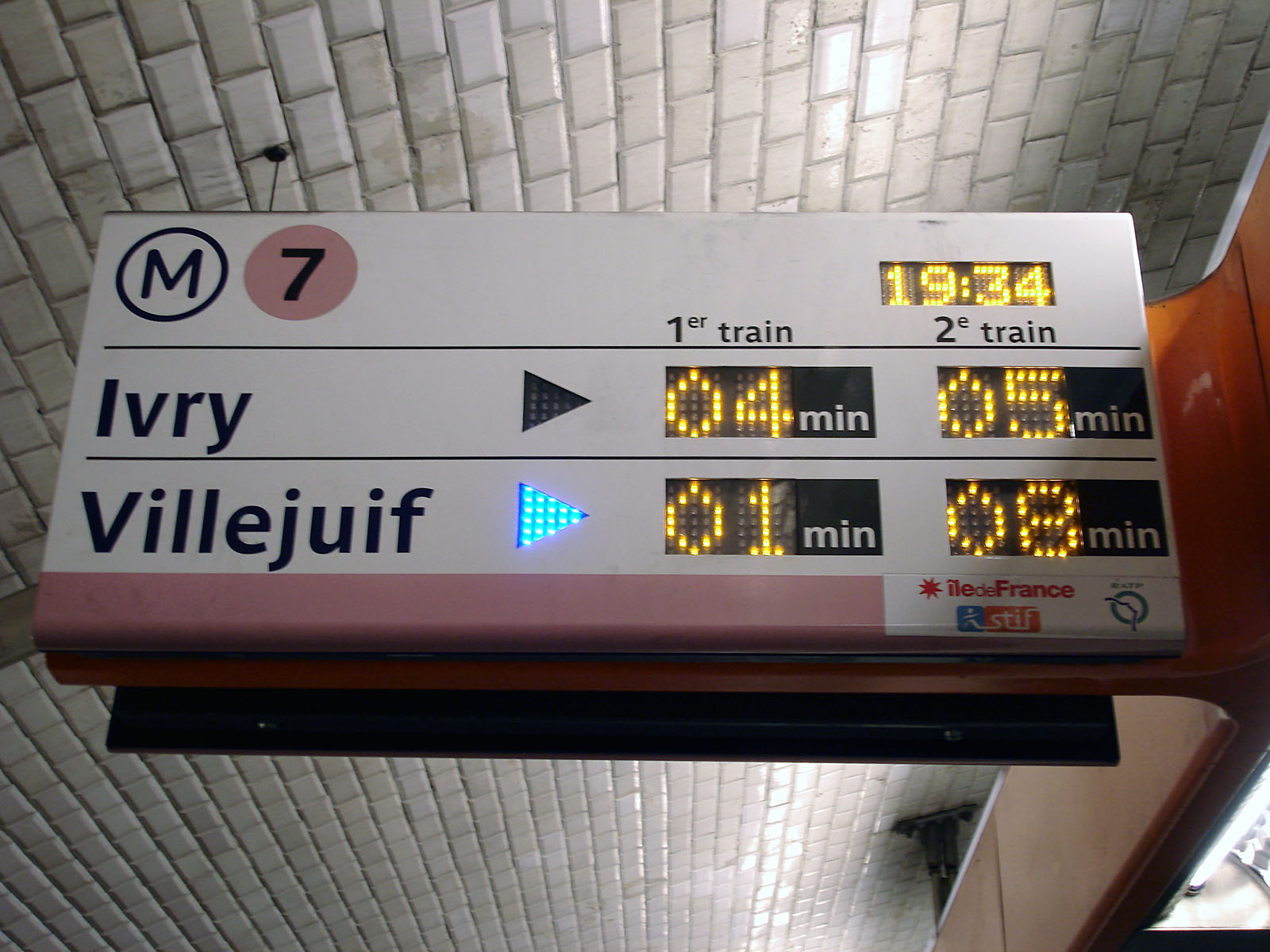 Panneau SIEL à la station Place Monge, de la ligne 7 du métro de Paris, France.